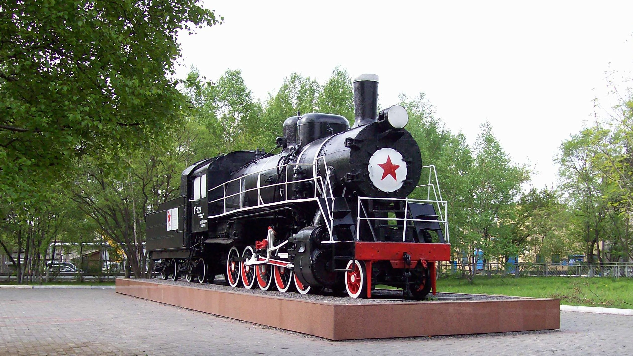 Паровоз Ел-629 на станции Уссурийск